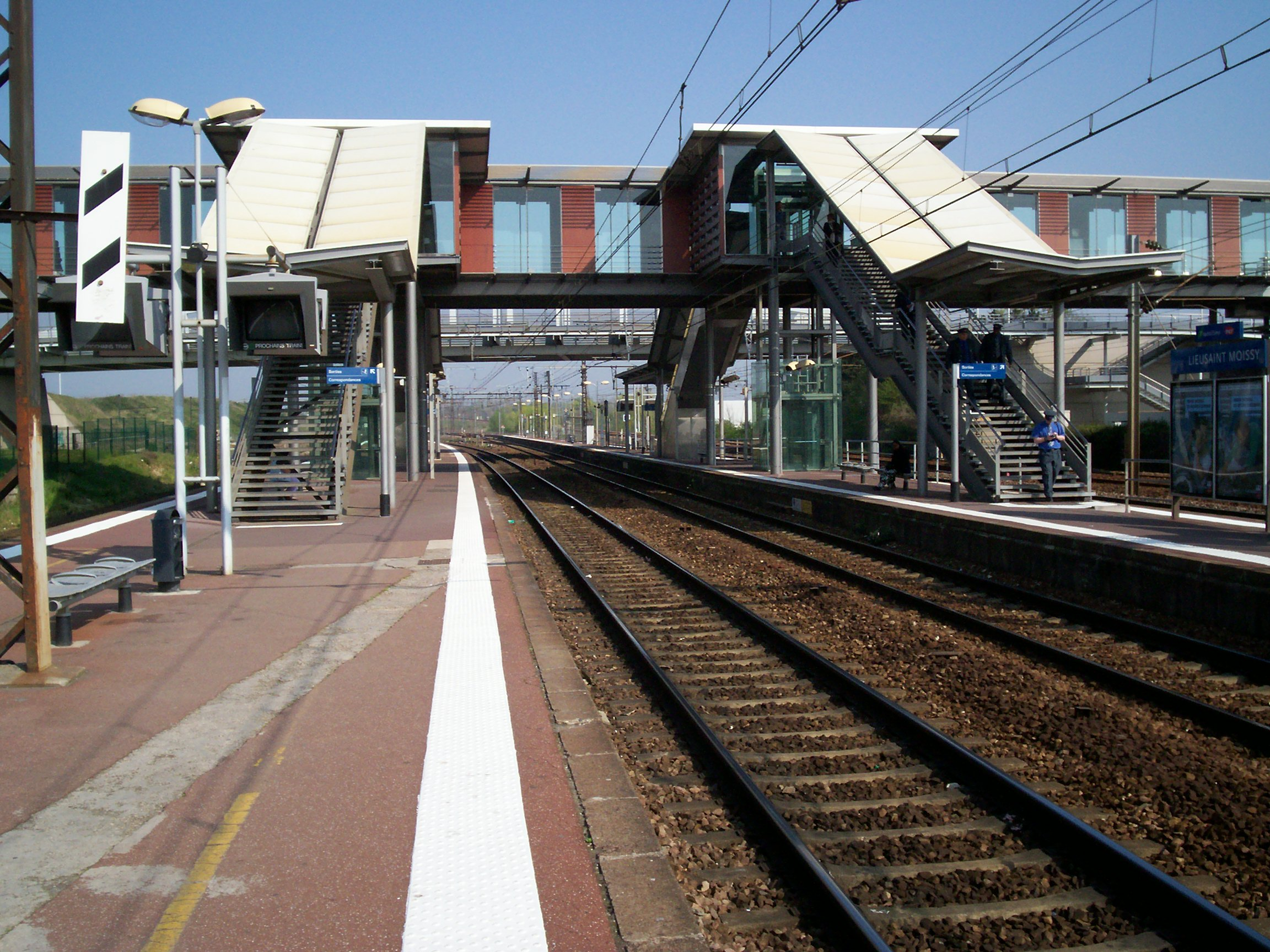 Gare de Lieusaint-Moissy